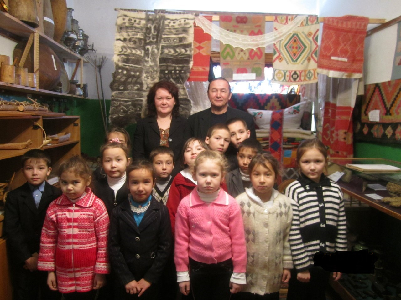 В музее Зуяковской школы Белорецкого района с рук. музея Р.Г. Шайбаковым. 2011 год